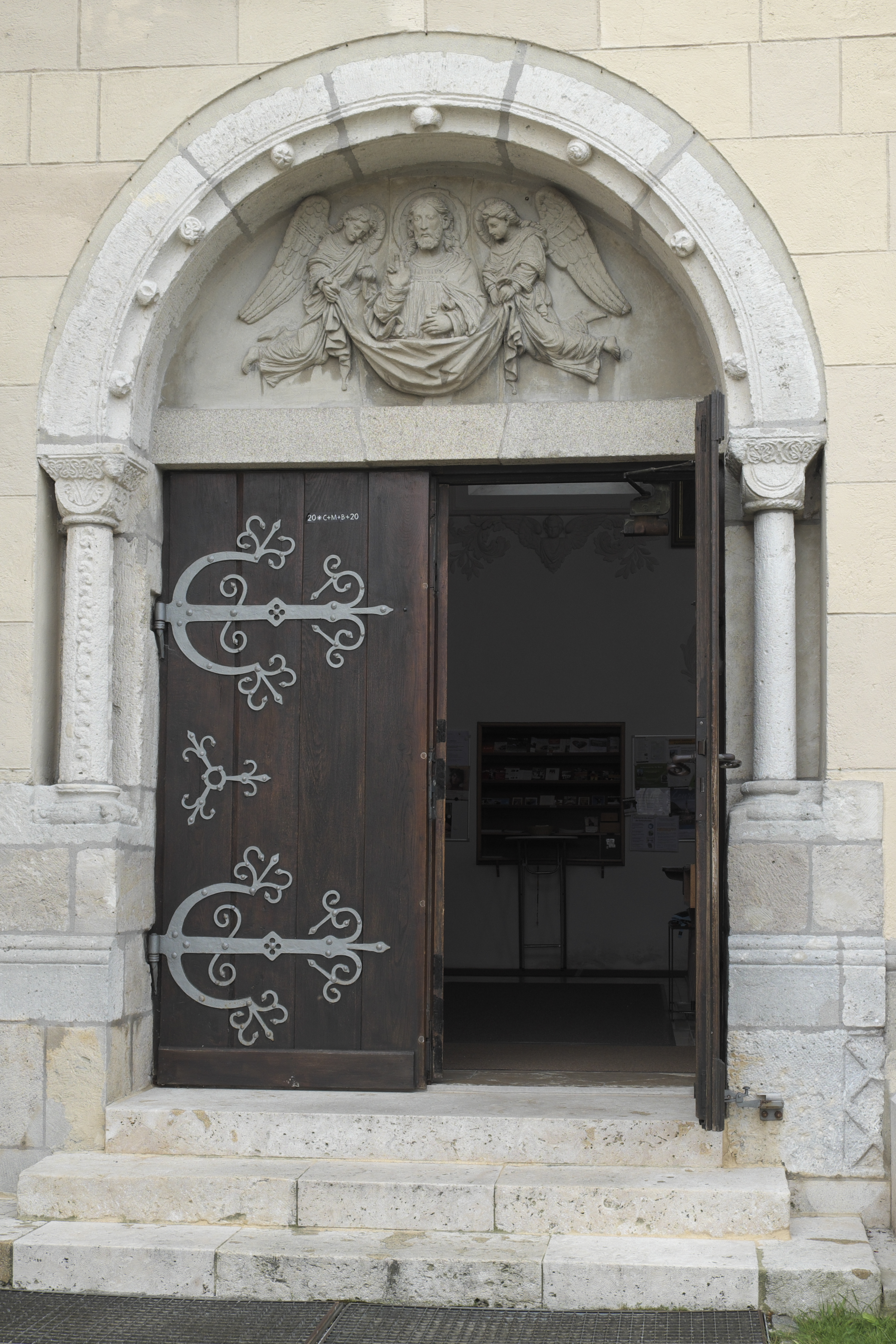 Katholische Pfarrkirche St. Leonhard in Pförring im oberbayerischen Landkreis Eichstätt (Bayern/Deutschland), östliches Nordportal mit den beiden Kapitellen und der linken Säule aus romanischer Zeit